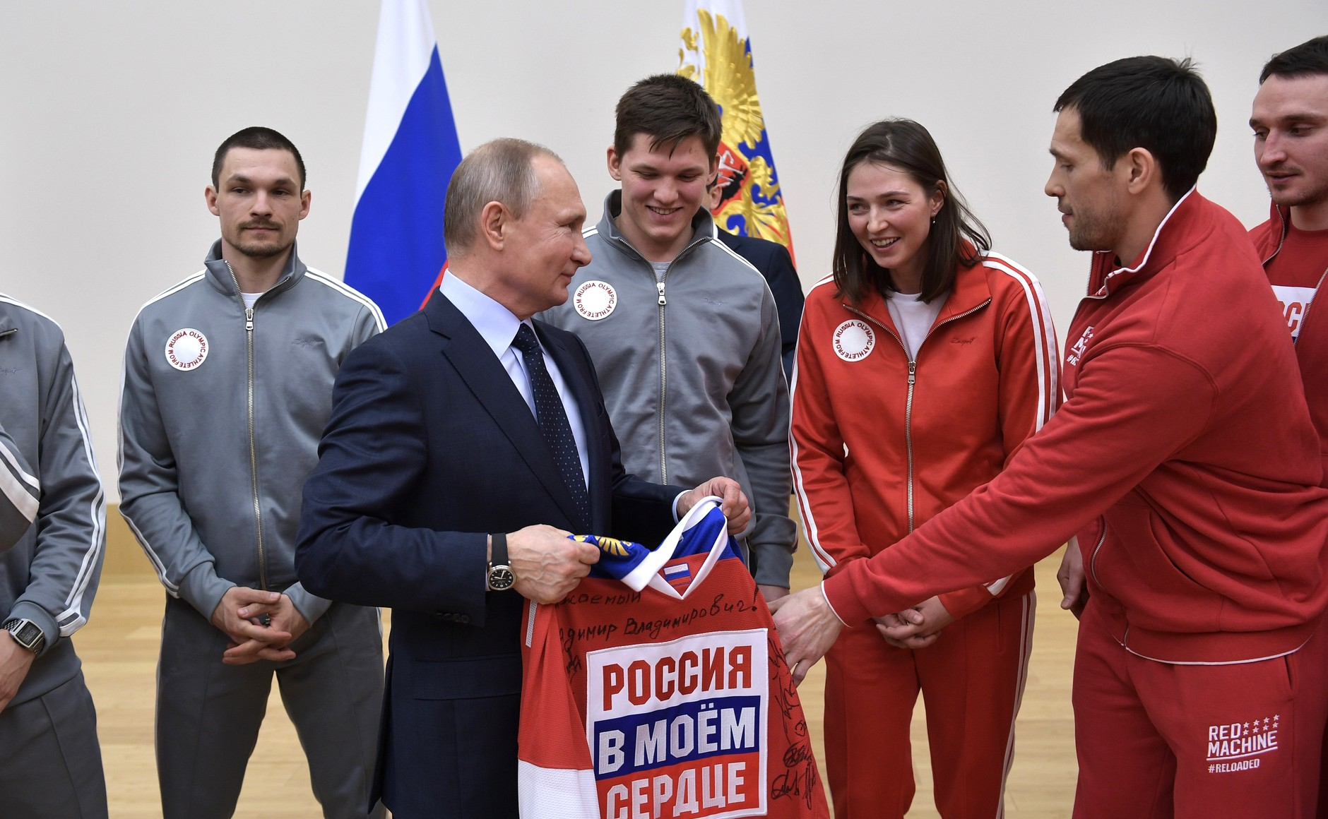 Капитан Олимпийской сборной российских хоккеистов Павел Дацюк вручил Владимиру Путину свитер с автографами игроков и символикой «Россия в моём сердце».